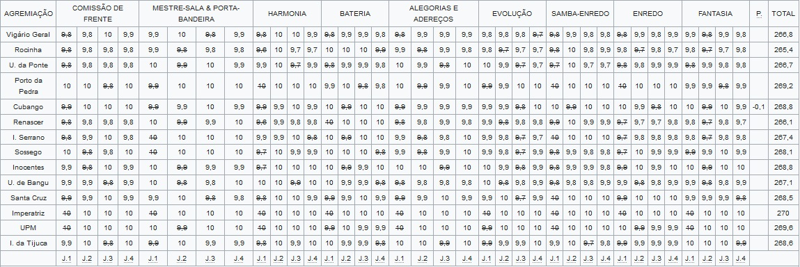 Resultados do Carnaval do Rio em 2020 - Grupo de acesso